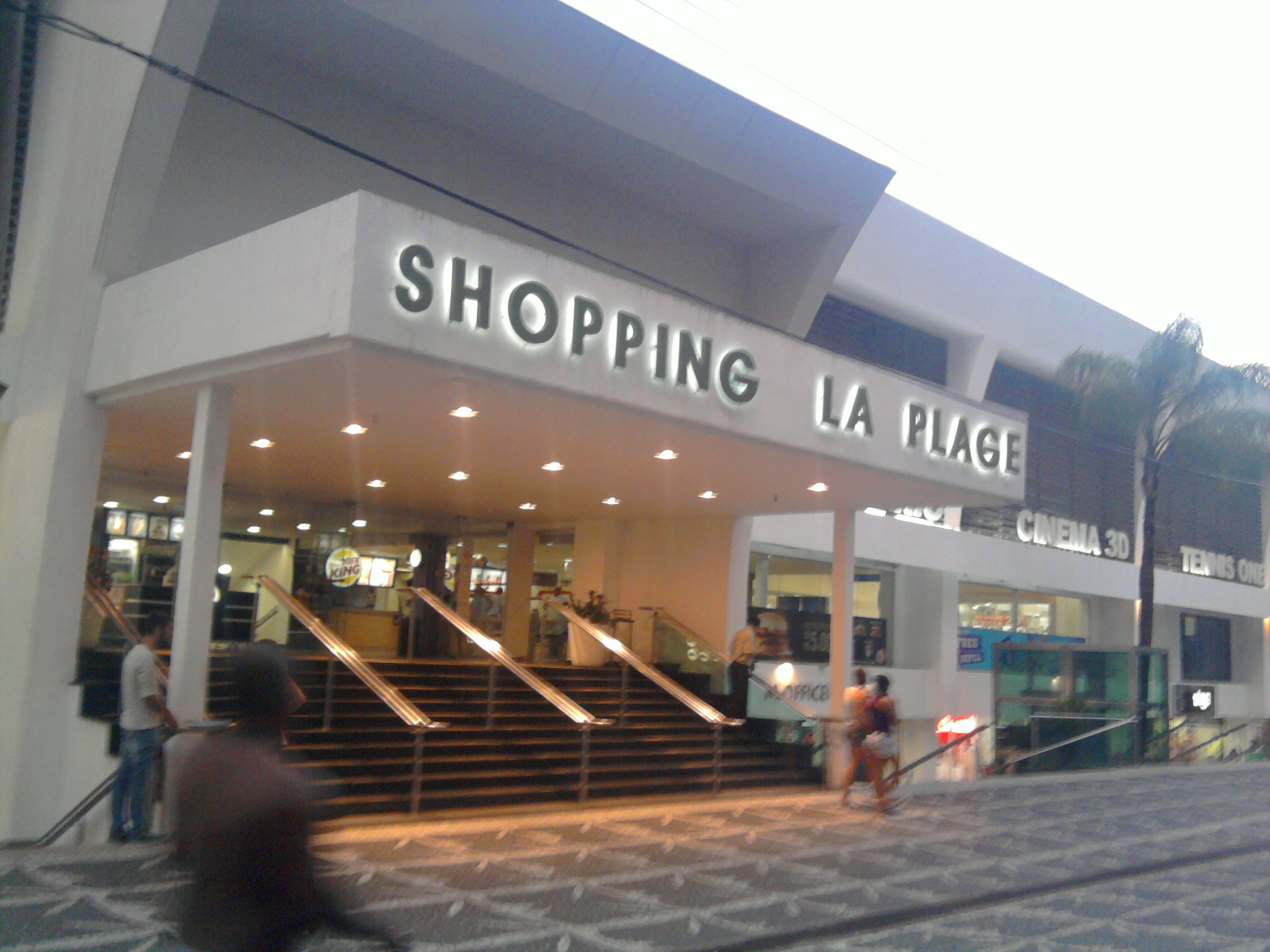 Shopping La Plage, localizado na praia da Pitangueiras no Guarujá, São paulo, Brasil